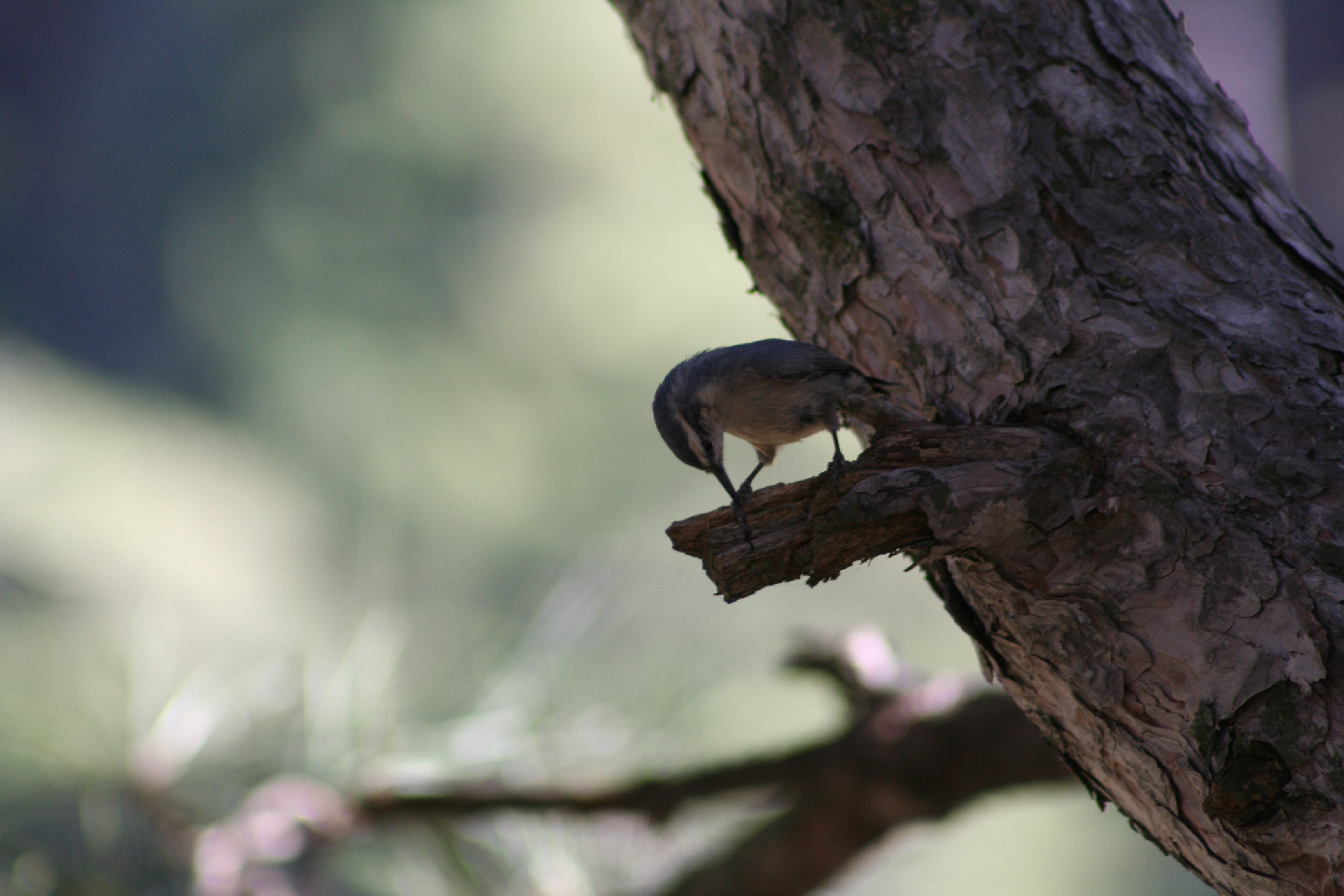 Una espècie endèmica de Còrsega, el Pica-soques cors. A la Vall de Restonica, aprop de Corte (Còrsega). En cors l'anomenen Furmicula, Pichja sorda, pichjarina i capinera. Female individual.